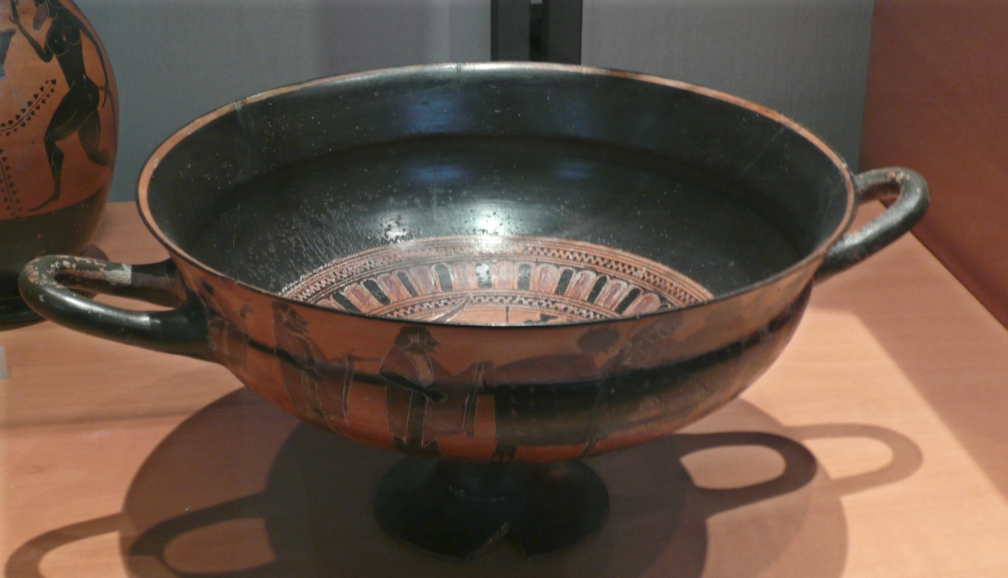 Coupe à anses Attique, 570-560 av J.C.,type coupe de Siana, céramique à figures noires. Antiquité classique musée d’archéologie méditerranéenne de la vieille charité à Marseille.